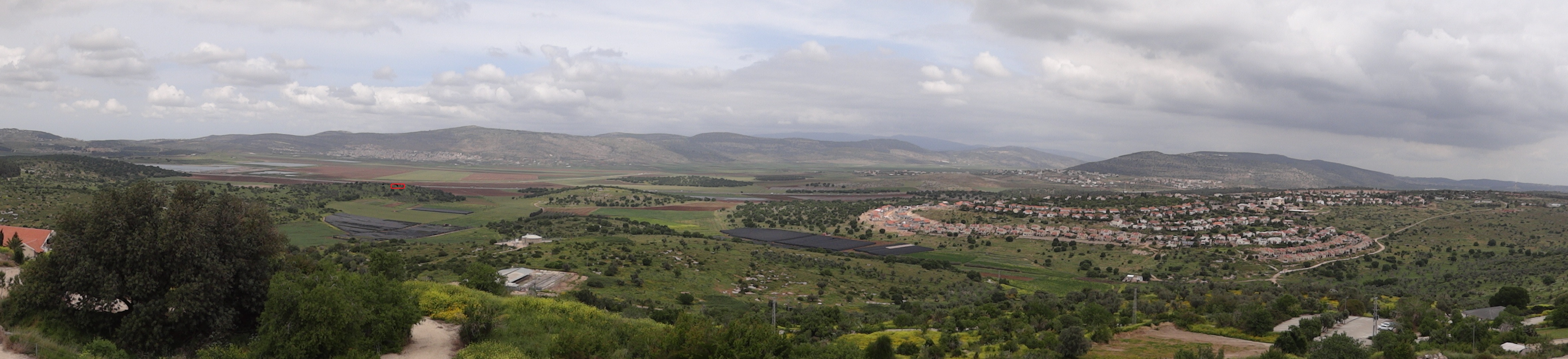 Beit Netofa valley', Israel בקעת בית נטופה בגליל, ישראל מימין הושעיה, משמאל בקעת בית נטופה, מיקום שיחין העתיקה מסומן במלבן אדום על הגבעה השמאלית השנייה להושעיה